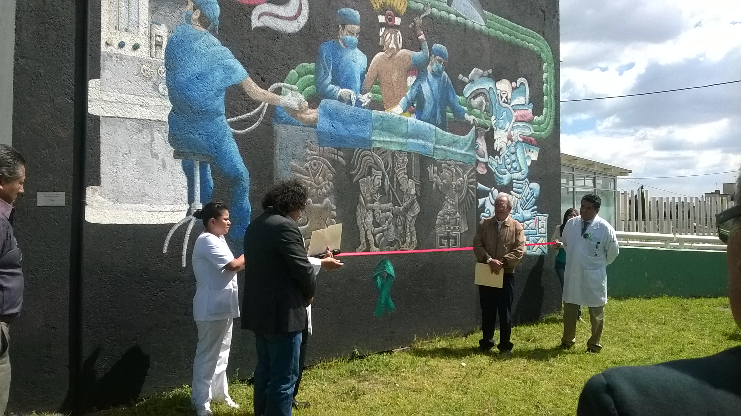 Vigos cortando el Liston